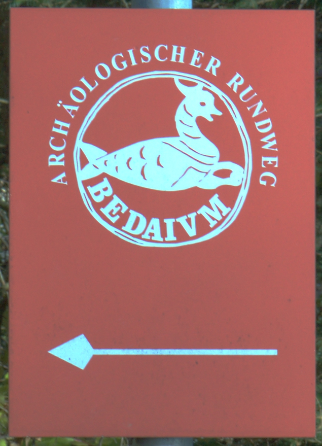 Wegweiser des Archäologischen Rundweges durch die Gemeinde Seeon-Seebruck .